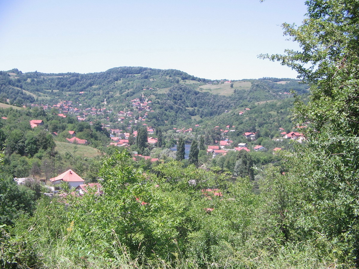 Поглед на Српске топлице (Шехер)